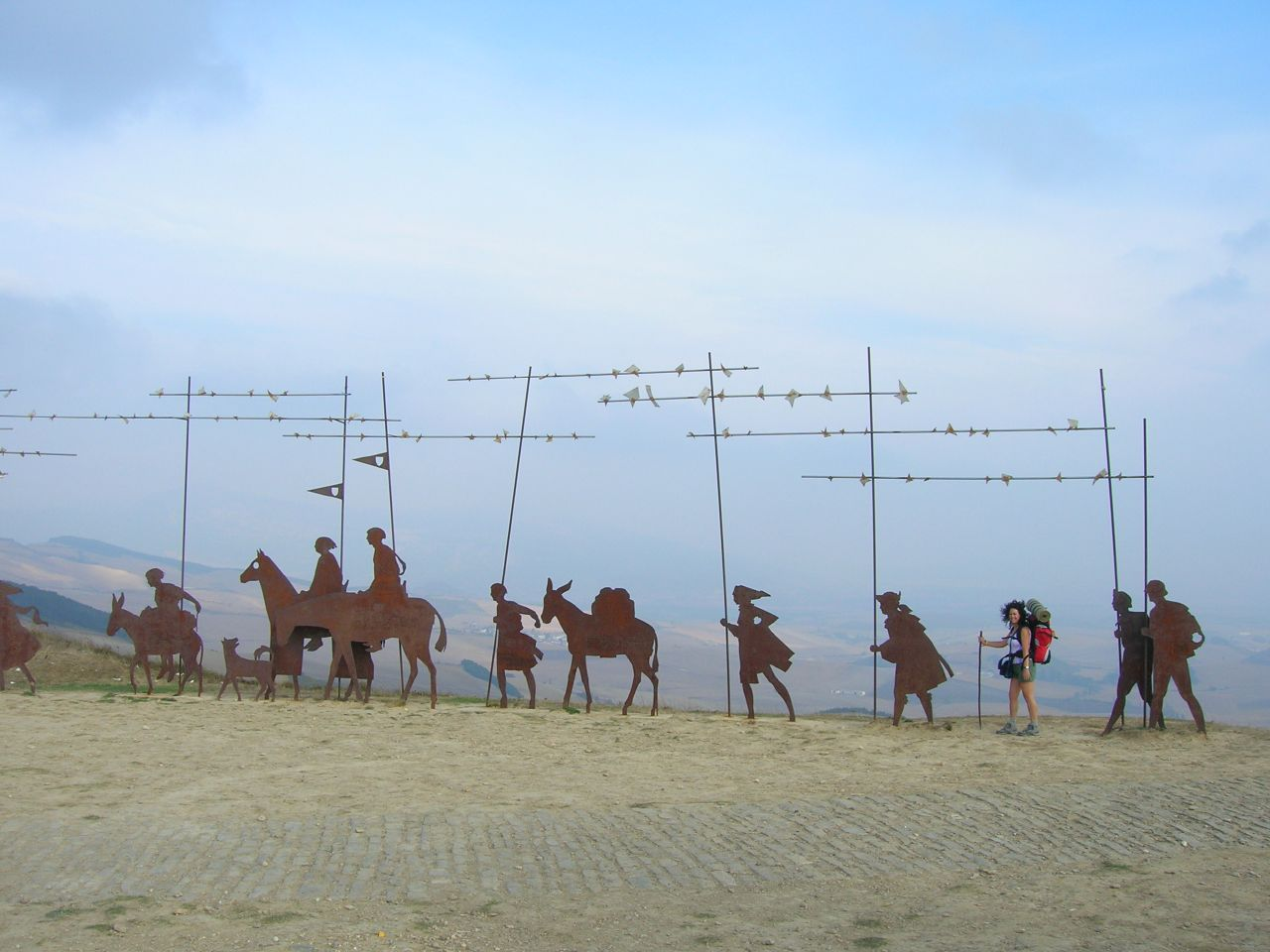 Al coronar la cumbre nos encontramos con el Monumento del Peregrino. Una hilera de peregrinos metálicos lo adorna componiendo una de las imágenes más sugerente de la ruta. En el extremo opuesto se puede leer un cartel que dice: Donde se cruza el Camino del viento con el de las estrellas. Vuela hasta esta localización. Necesitas el programa Google Earth.